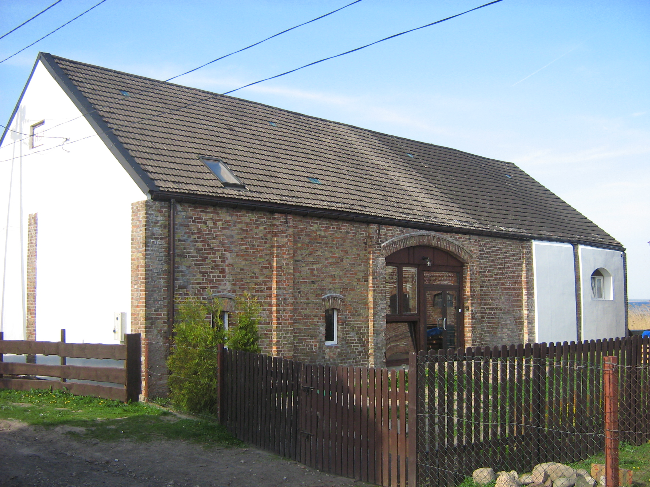 Dom w Graniku przerobiony ze stodoły.